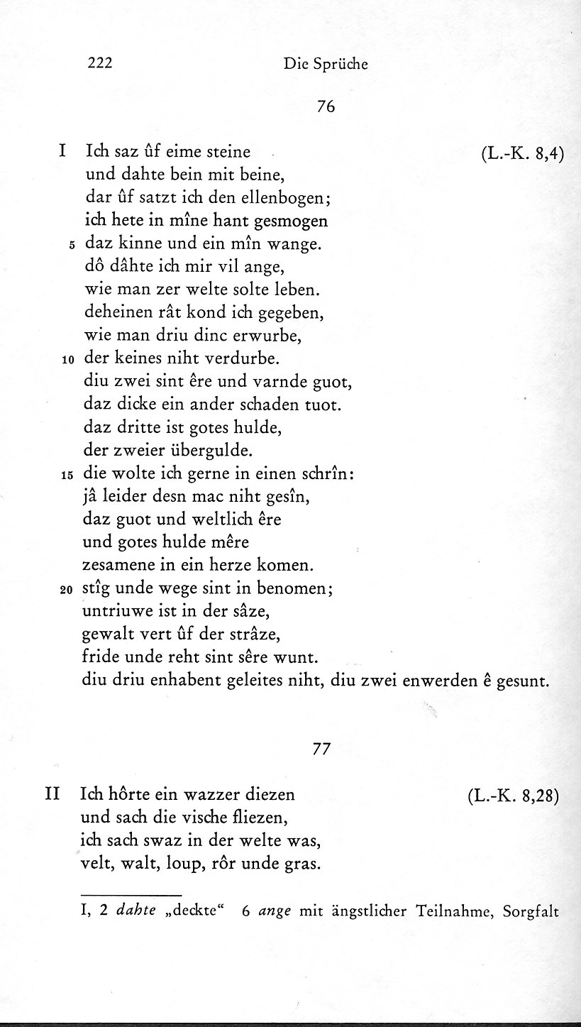 Reichston_1